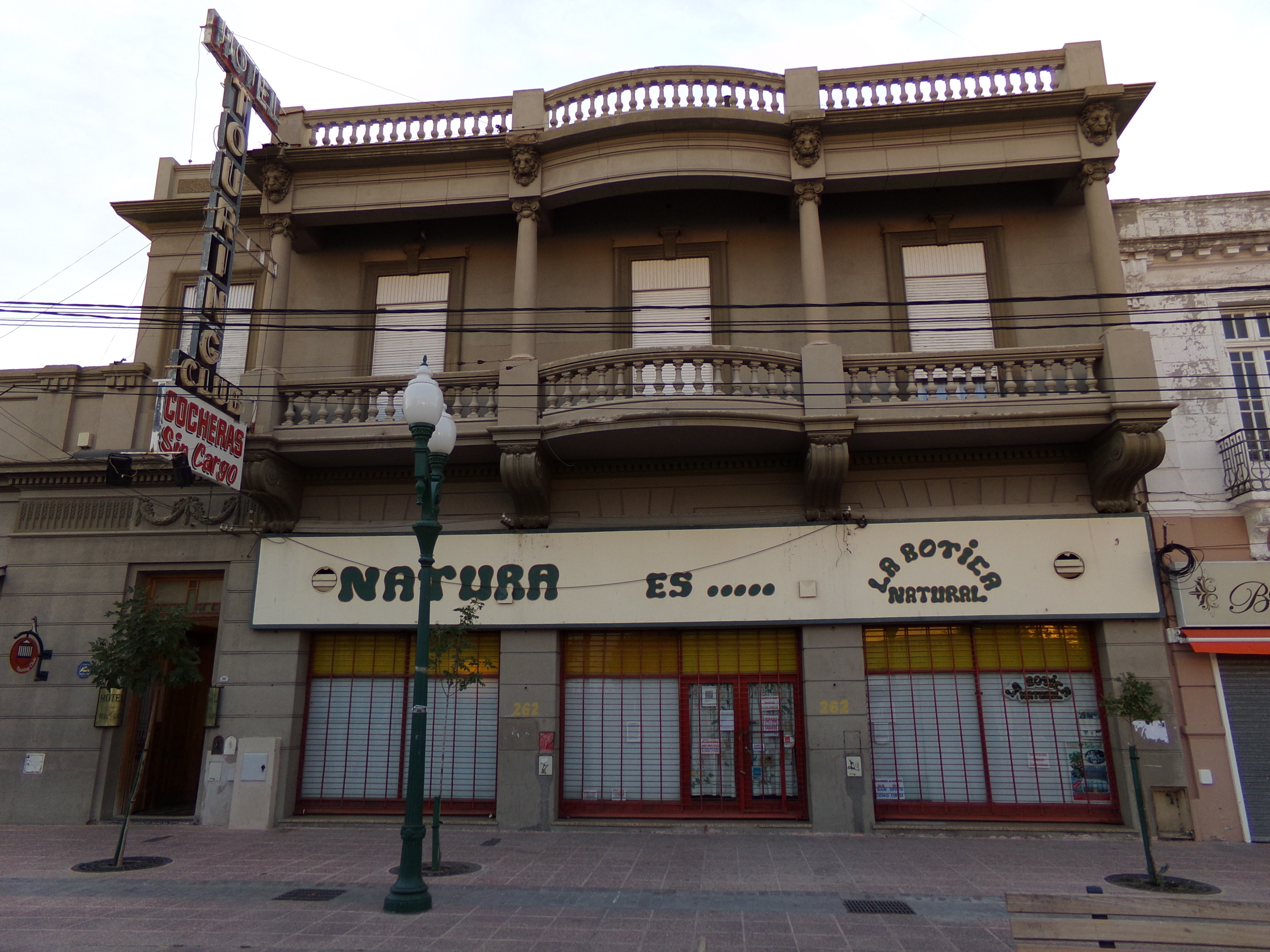 Hotel Touring Club